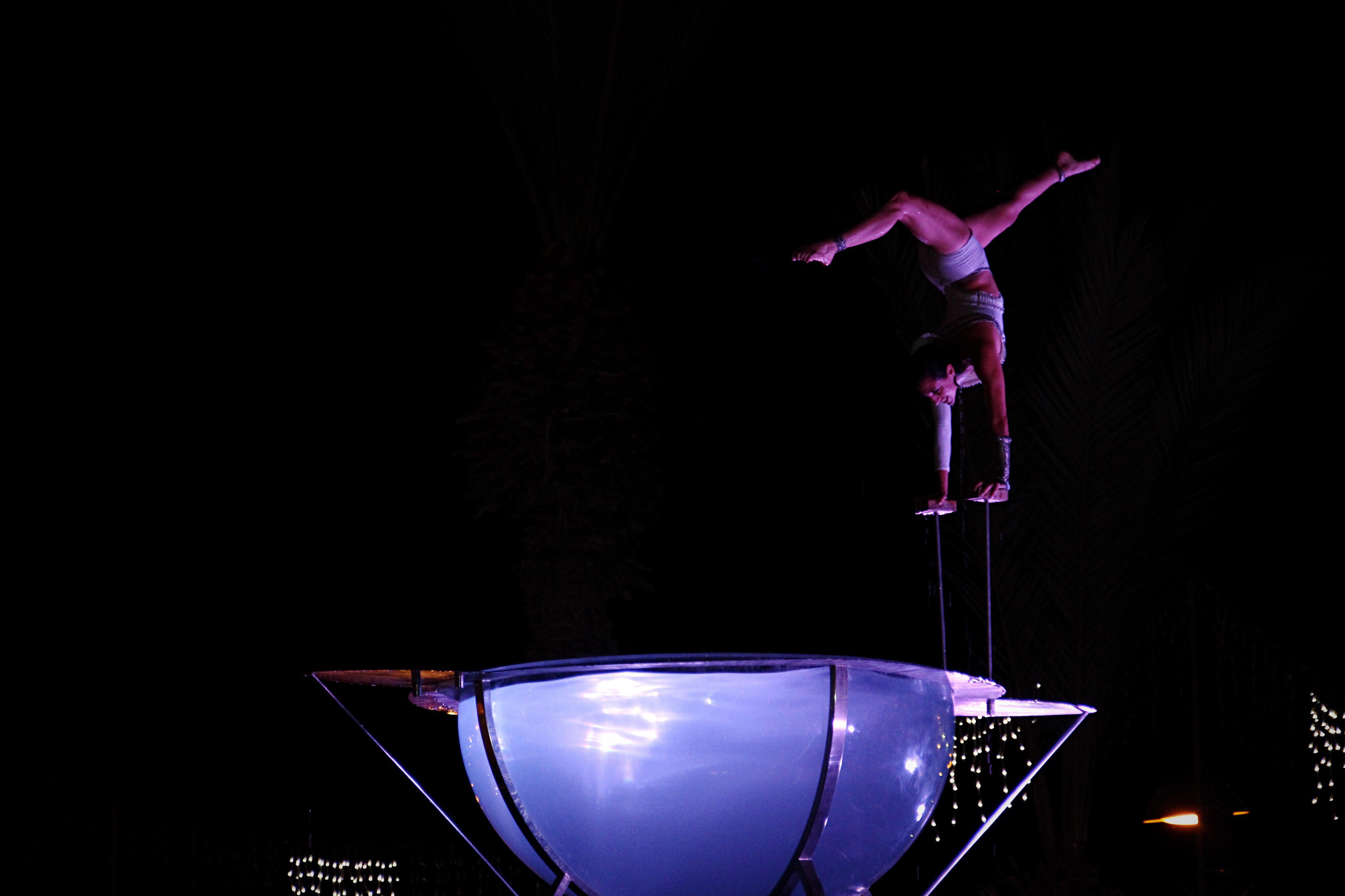 מופע מים על גג בפסטיבל עכו 2016.